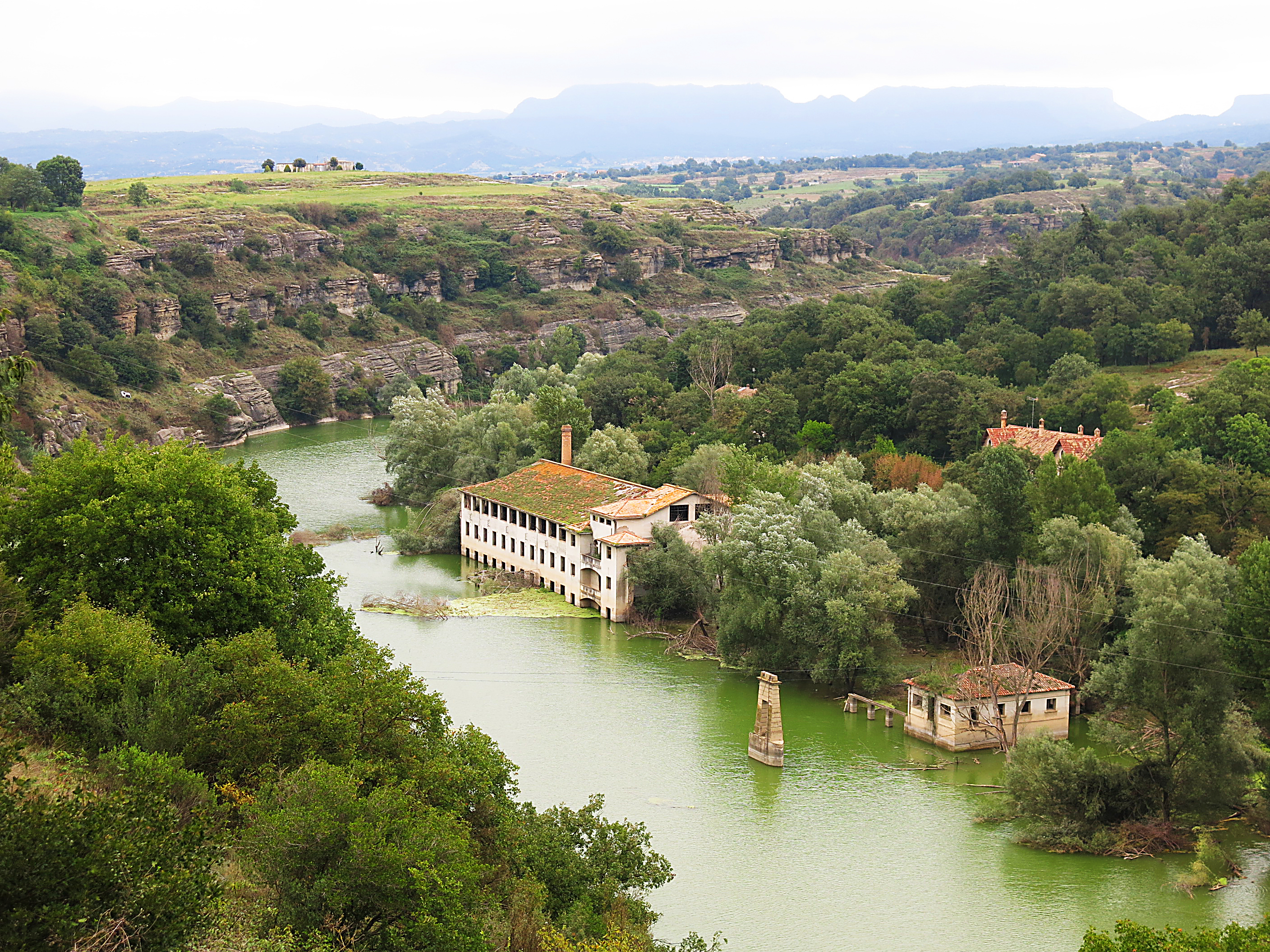 Fàbrica Salou-Baurier (les Masies de Roda)